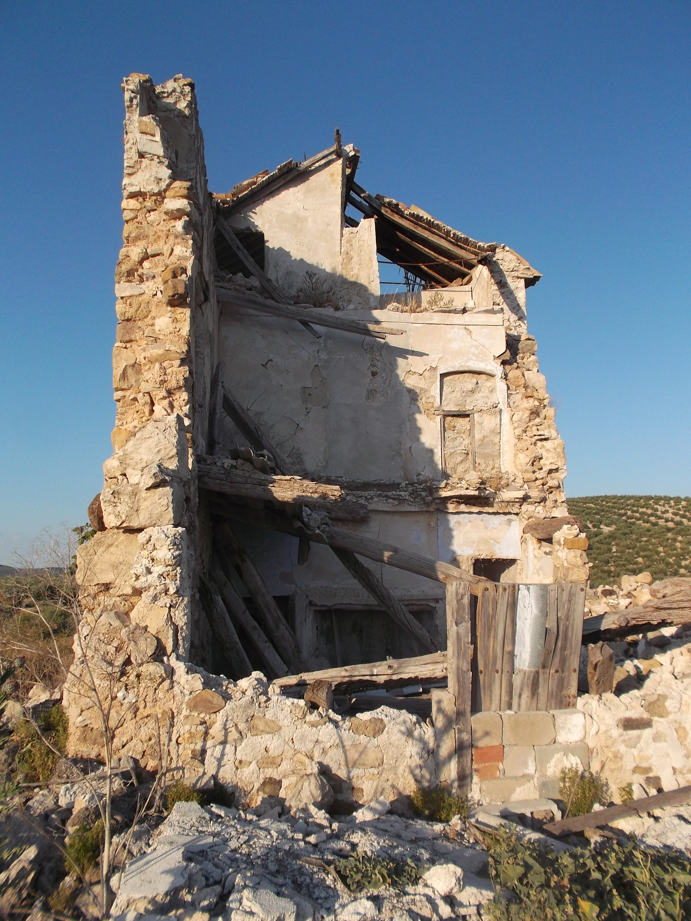 Vistas de la torre de Casa Fuerte